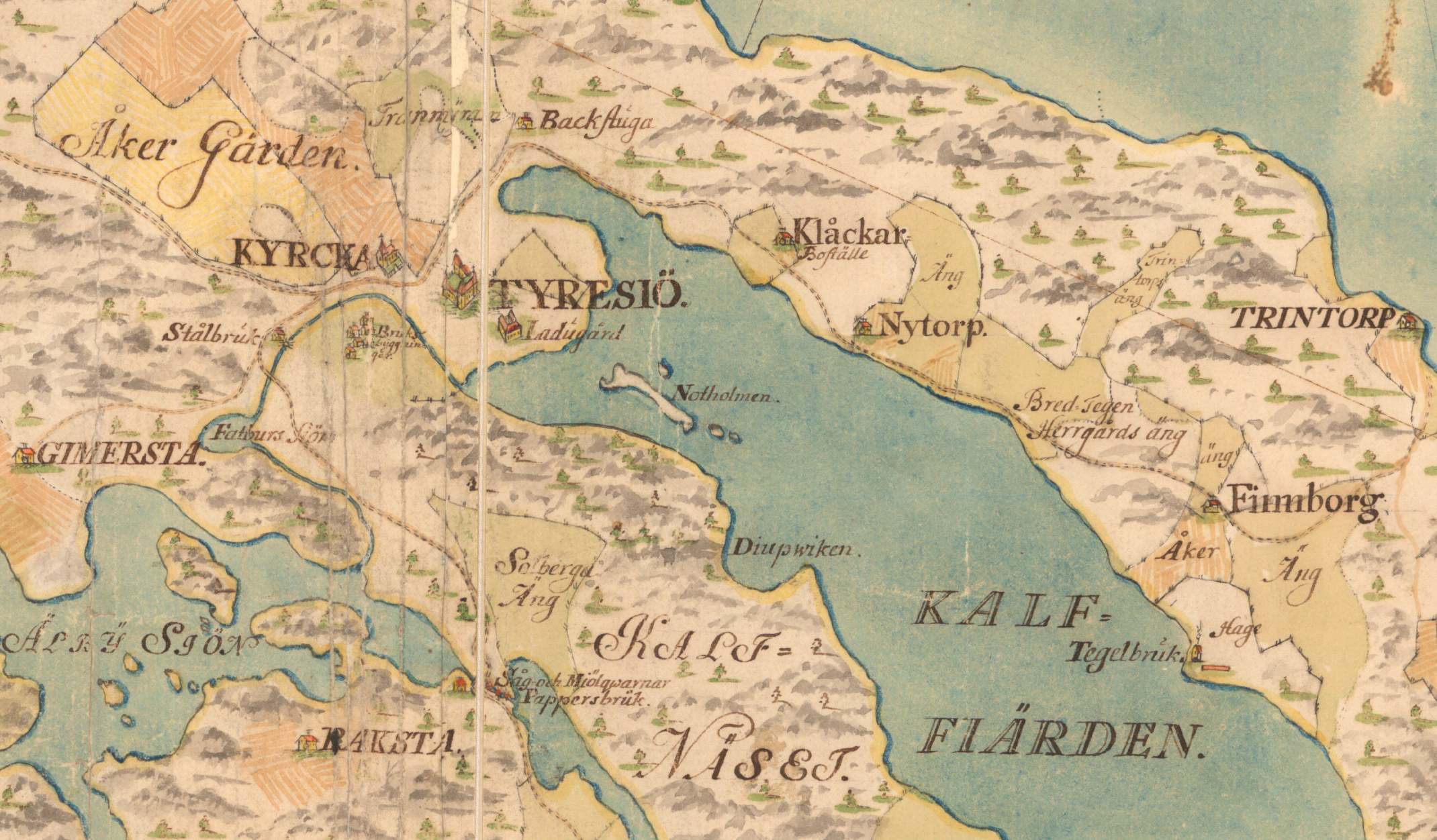 Tyresö slott ägomätning år 1748